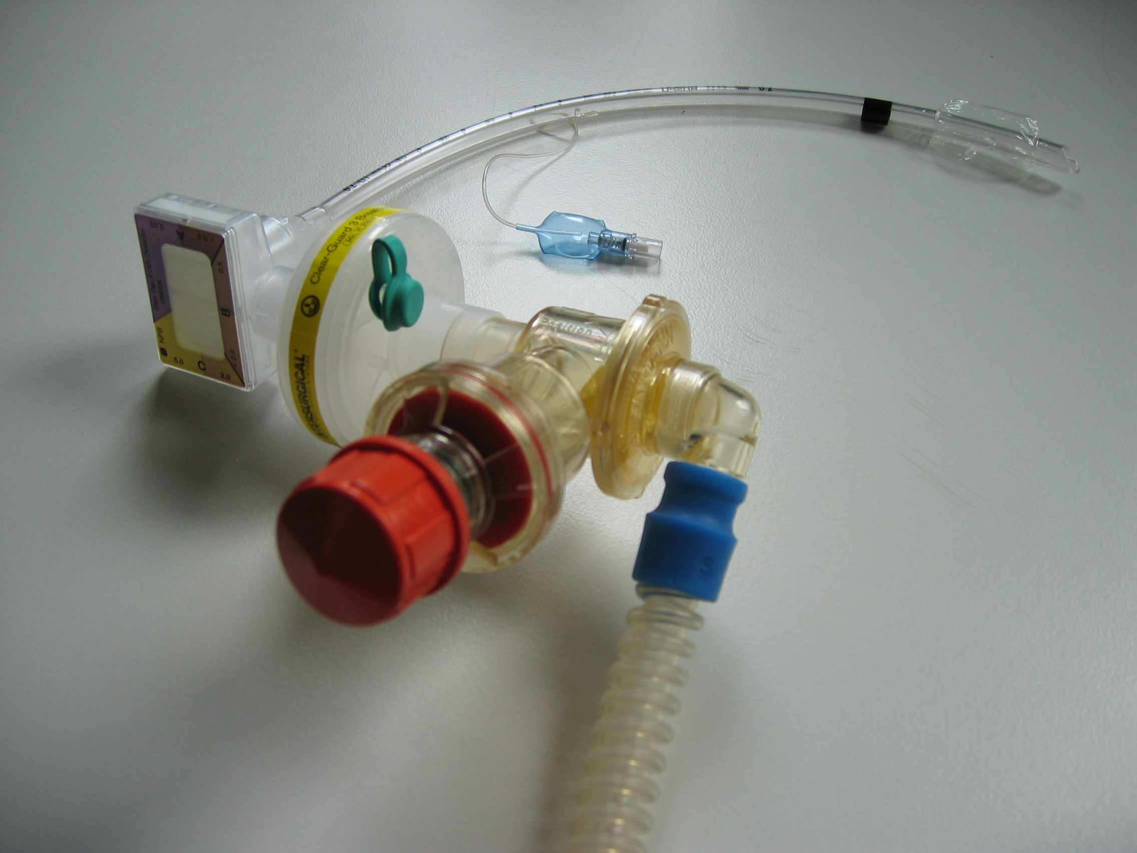 Beatmungssystem für einen Notfallpatienten - Endotrachealtubus, CO2-Detektor, Beatmungsfilter, Patientenventil, PEEP-Ventil